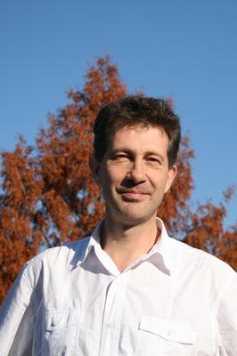 Foto di Peter Stevenhagen